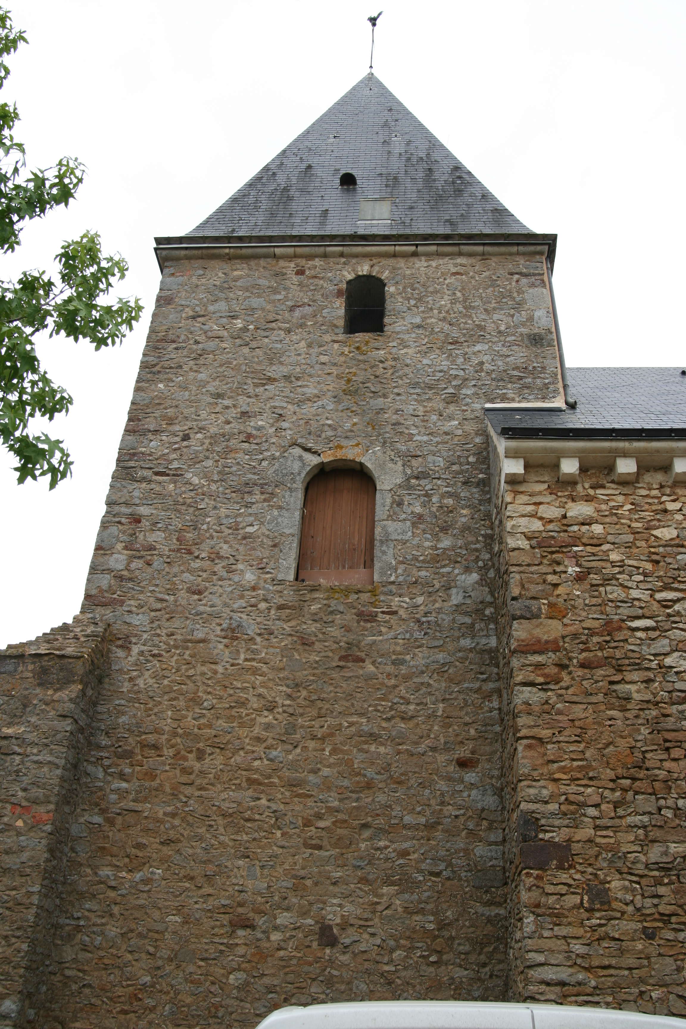 L'église de la Visitation de Chassillé.